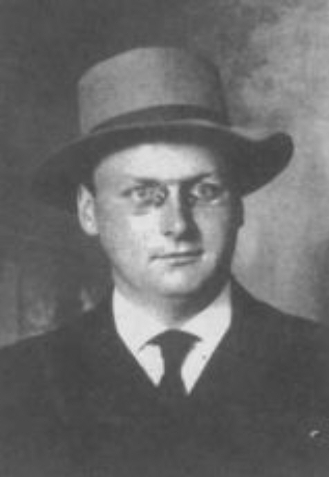 Eduard Bass (1887 - 1946), Český spisovatel, novinář, zpěvák, fejetonista a herec.